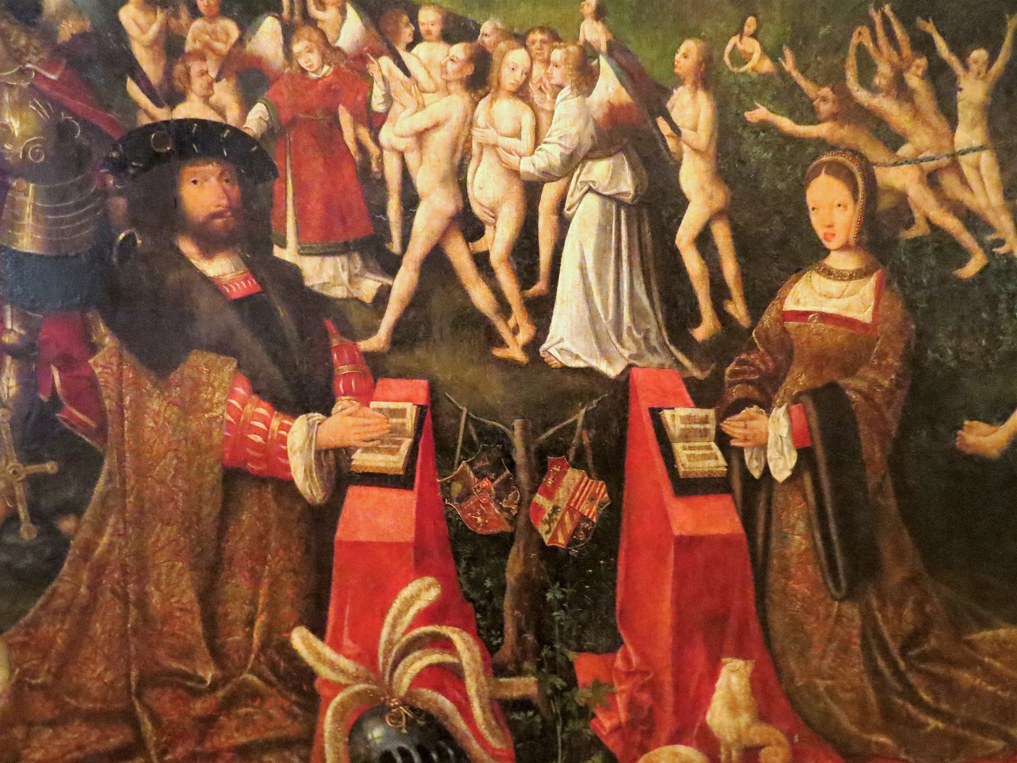 Christian II og dronning Elisabeth på altertavle fra Mariæ Kirke i Helsingør, nu i Nationalmuseet, København